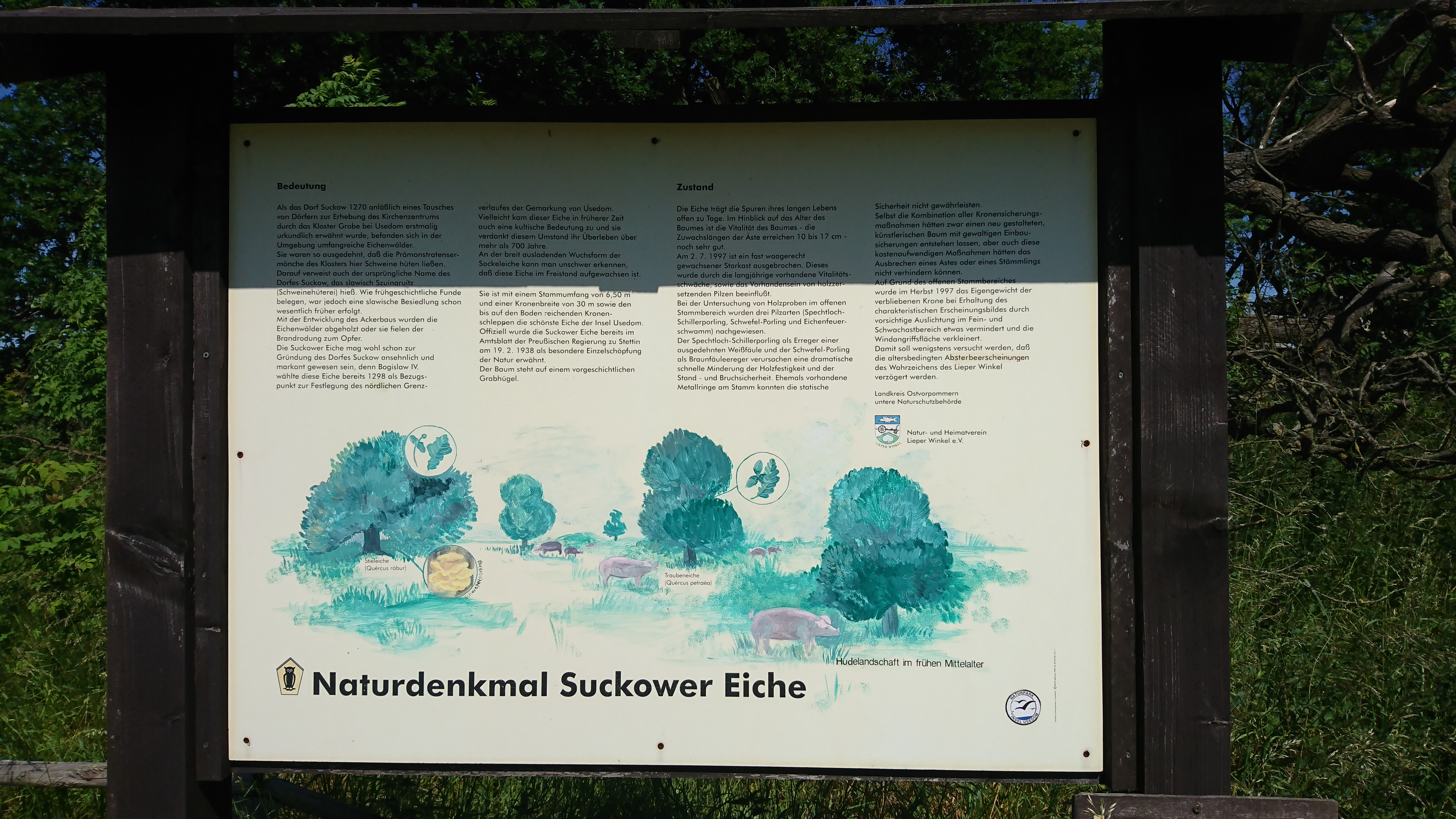 Beschreibung der Suckower Eiche, die aber nicht auf dem neuesten Stand ist, denn mittlerweile ist ein zweiter Hauptast abgebrochen.